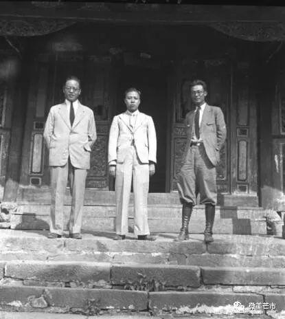 中文（中国大陆）: 1935年4月凌纯声、勇士衡前往遮放调查，与遮放头面人物合影，中为多英培